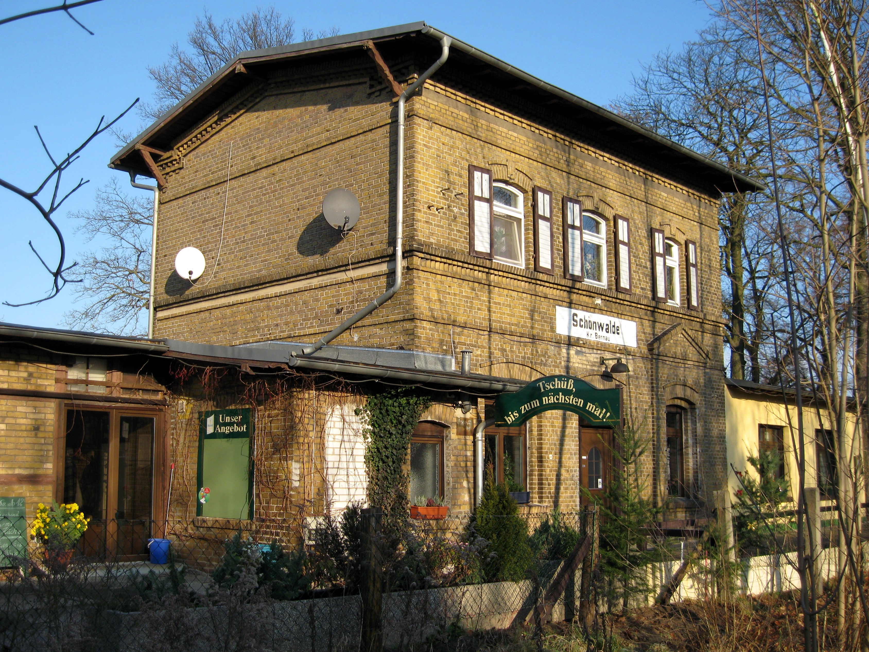 Altes Bahnhofsgebäude des Ortes Schönwalde (Barnim), Gemeinde Wandlitz, Land Brandenburg, Deutschland